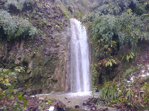 آبشار افراسره